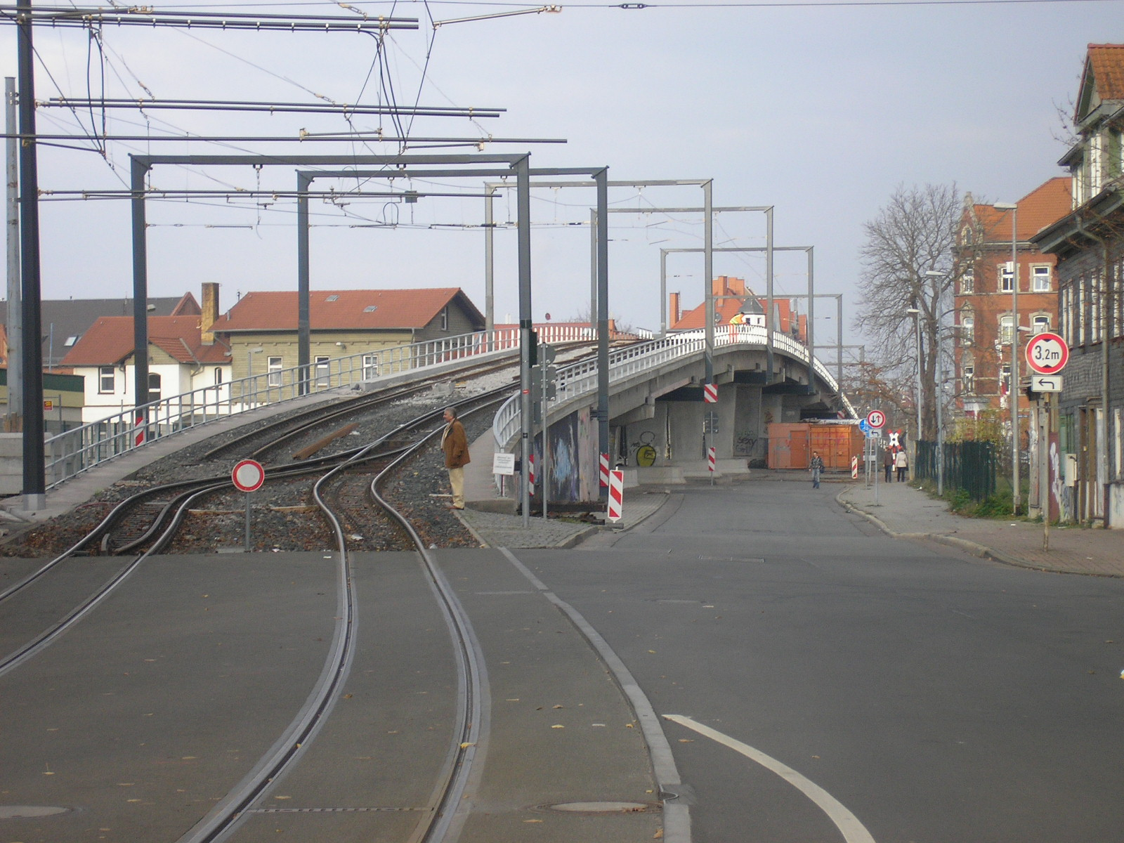 Die Stadtbahnbrücke über die Nordhäuser Bahn in der Magdeburger Allee im Norden Erfurts.